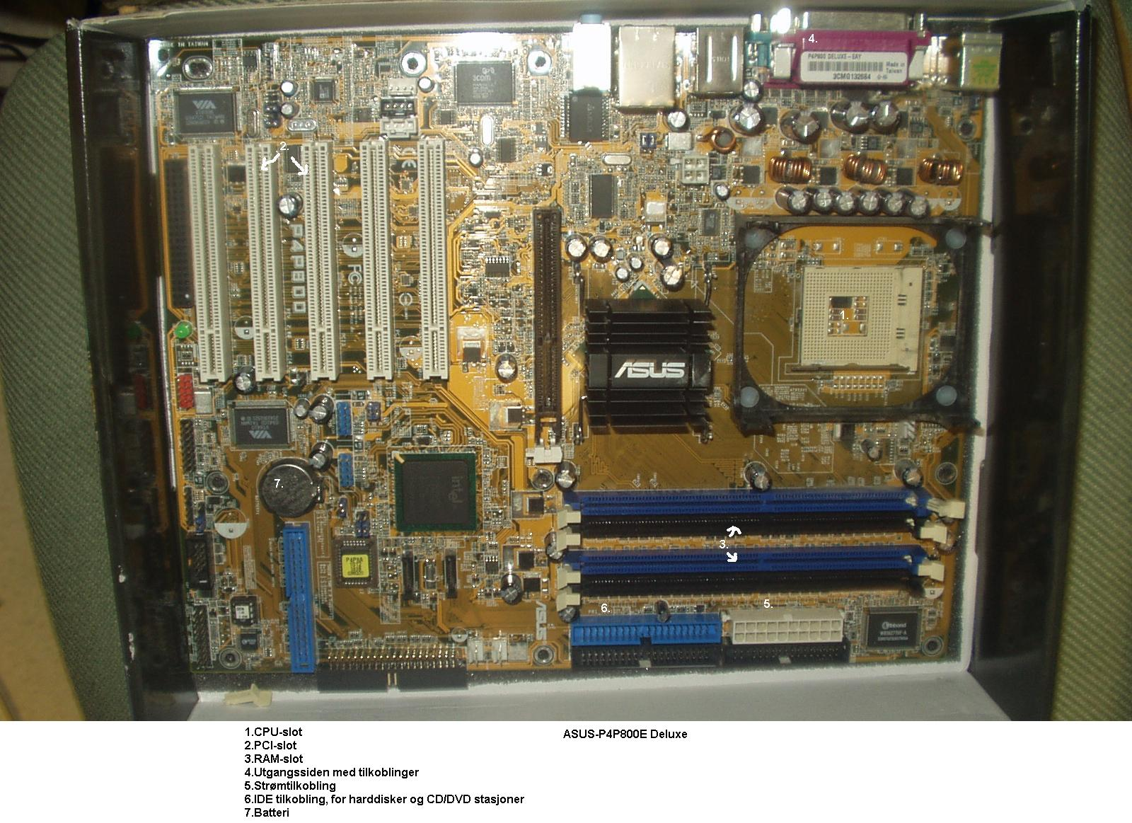 Bilde av et hovedkort, med beskrivelser.